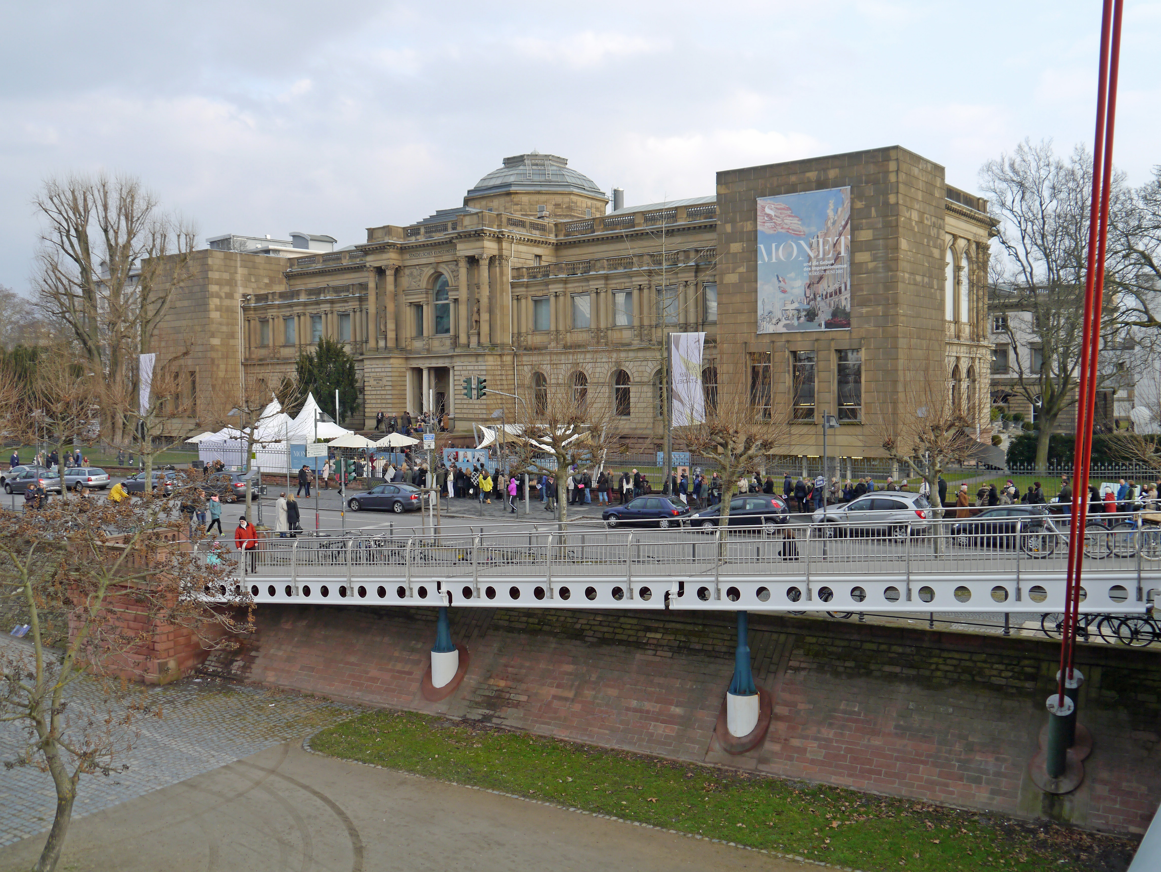 Das Städel in Frankfurt am Main. Am 200. Stiftungstag, am 15. März 2015.